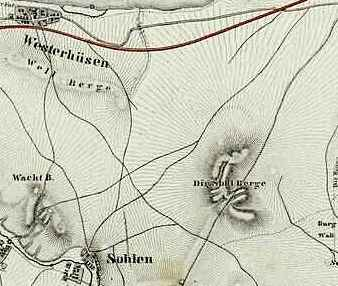 Ausschnitt aus einer Karte von Albrecht Platt, rechts unten: der Frohser Berg (als „Die Sohl Berge“ bezeichnet), links (Norden) die eigentlichen Sohlener Berge und Sohlen, rechts oben (Osten) Westerhüsen